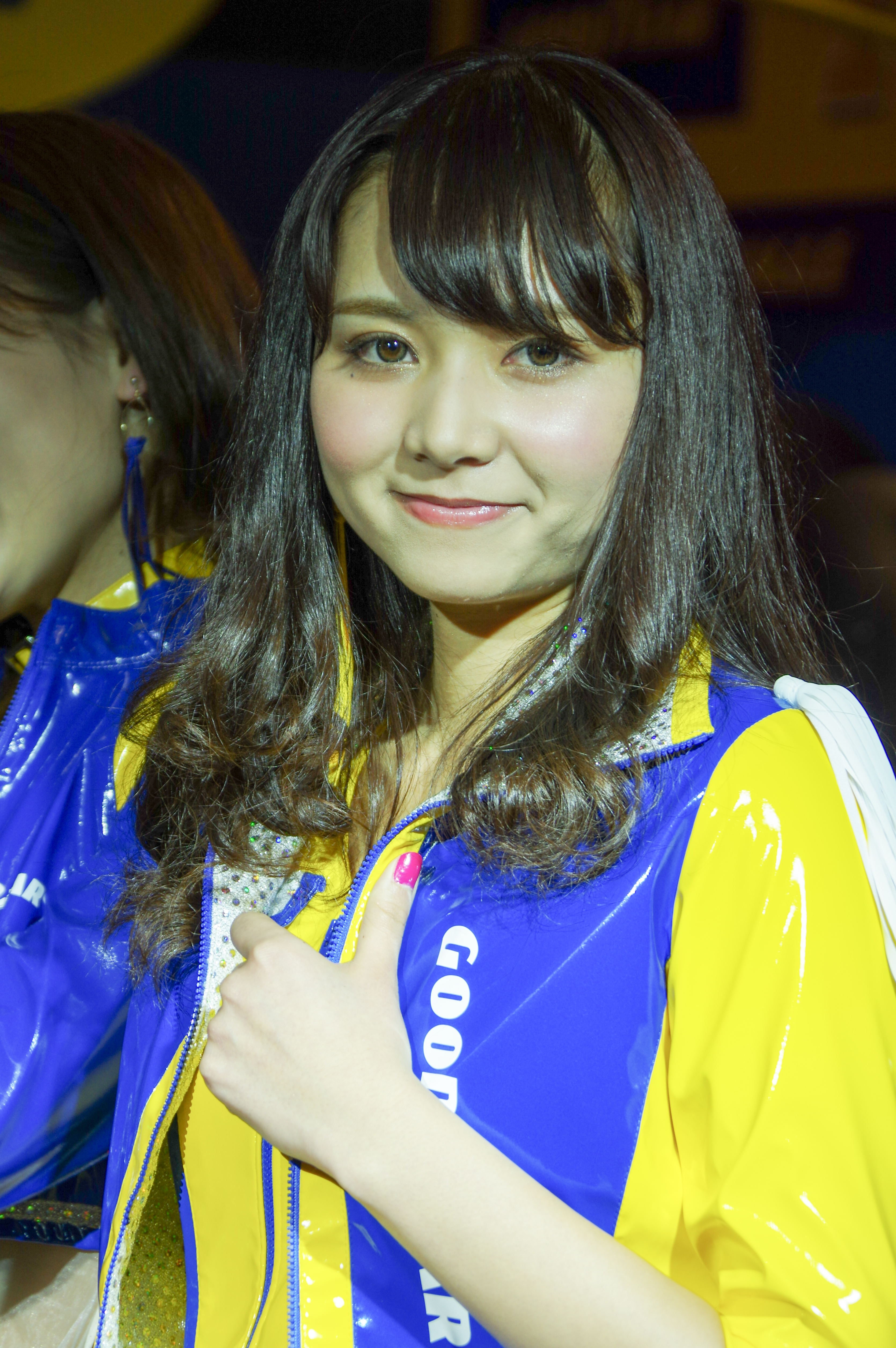 TOKYO AUTO SALON 2016 _44